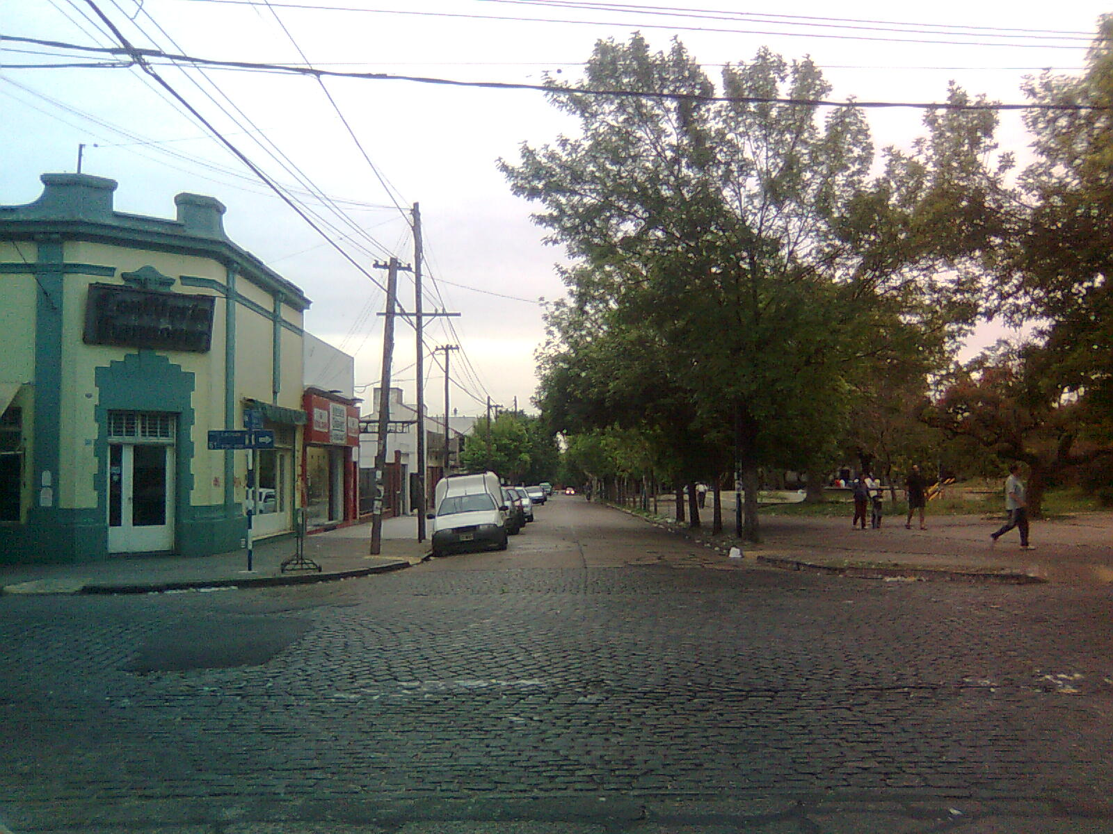 Esquina de Lacroze y Sgto. Cabral, en el barrio de Chilavert (Villa Ballester), Partido de San Martín, Bs. As., Argentina.